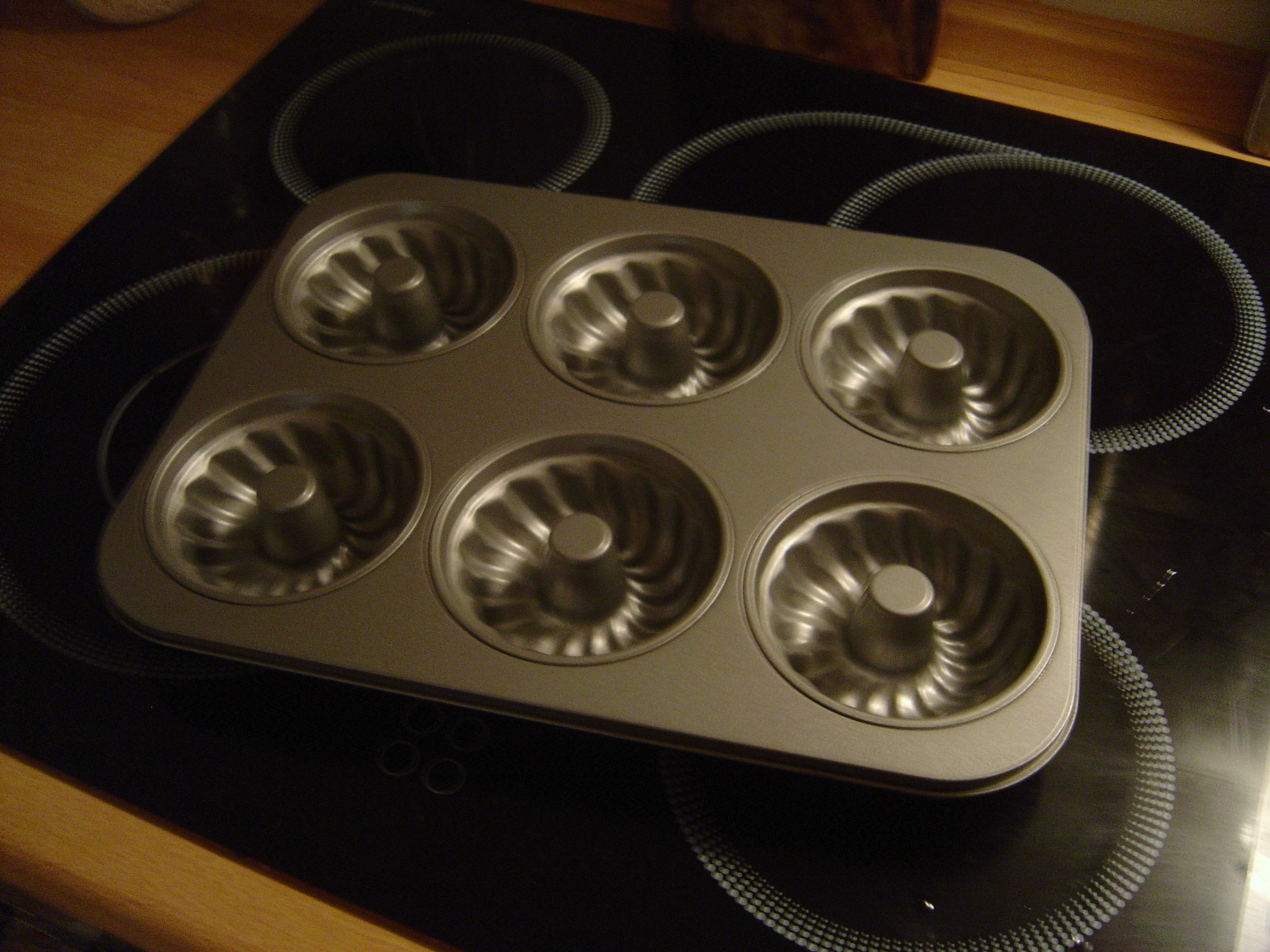 Cake tin for Mini-Gugelhupfs